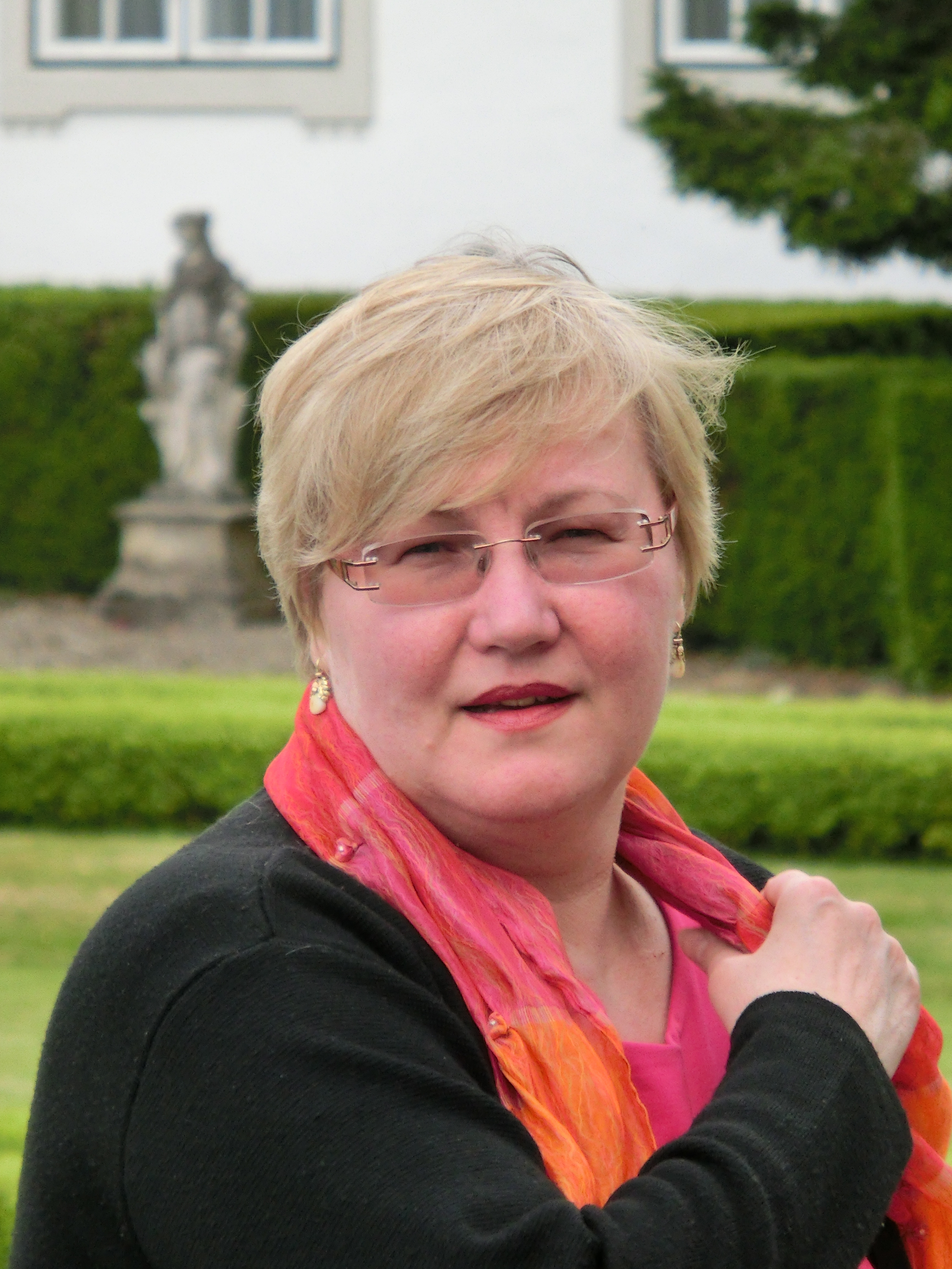 Sonia Jakuschewa, foto Jan Koblasa